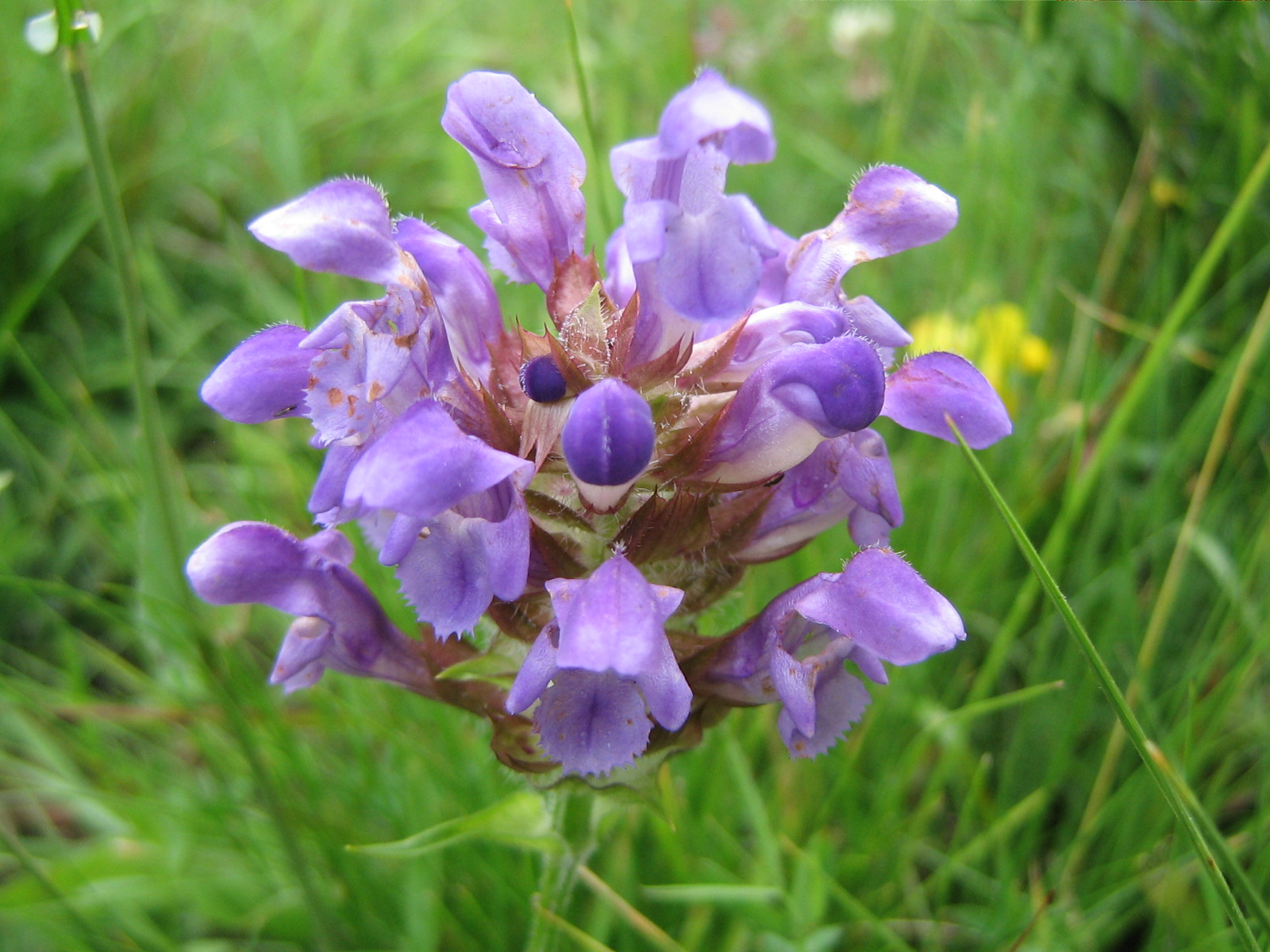 Brunelle à grandes fleurs - Aubrac (massif central, France)